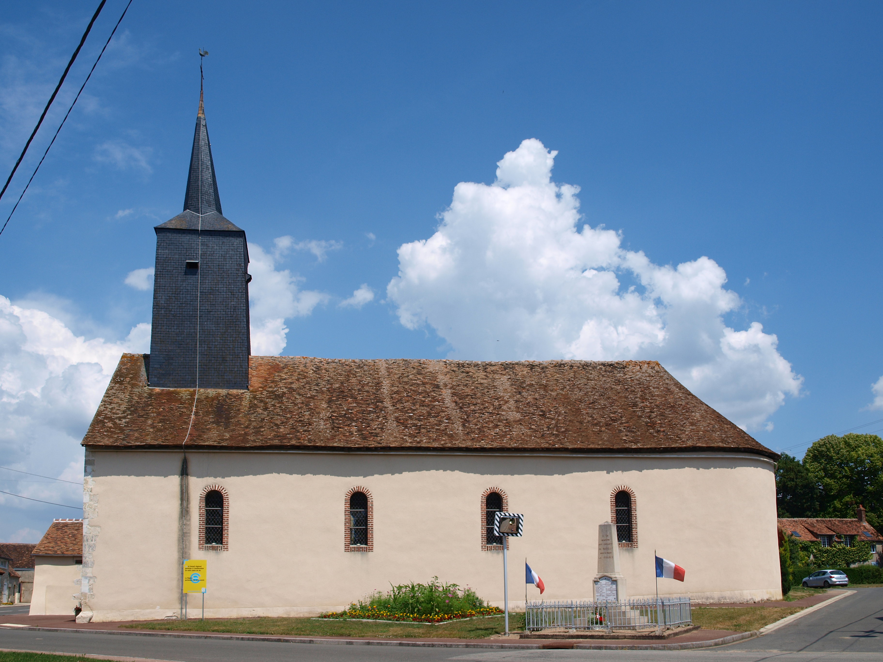 Batilly-en-Puisaye (Loiret, France) ; église.